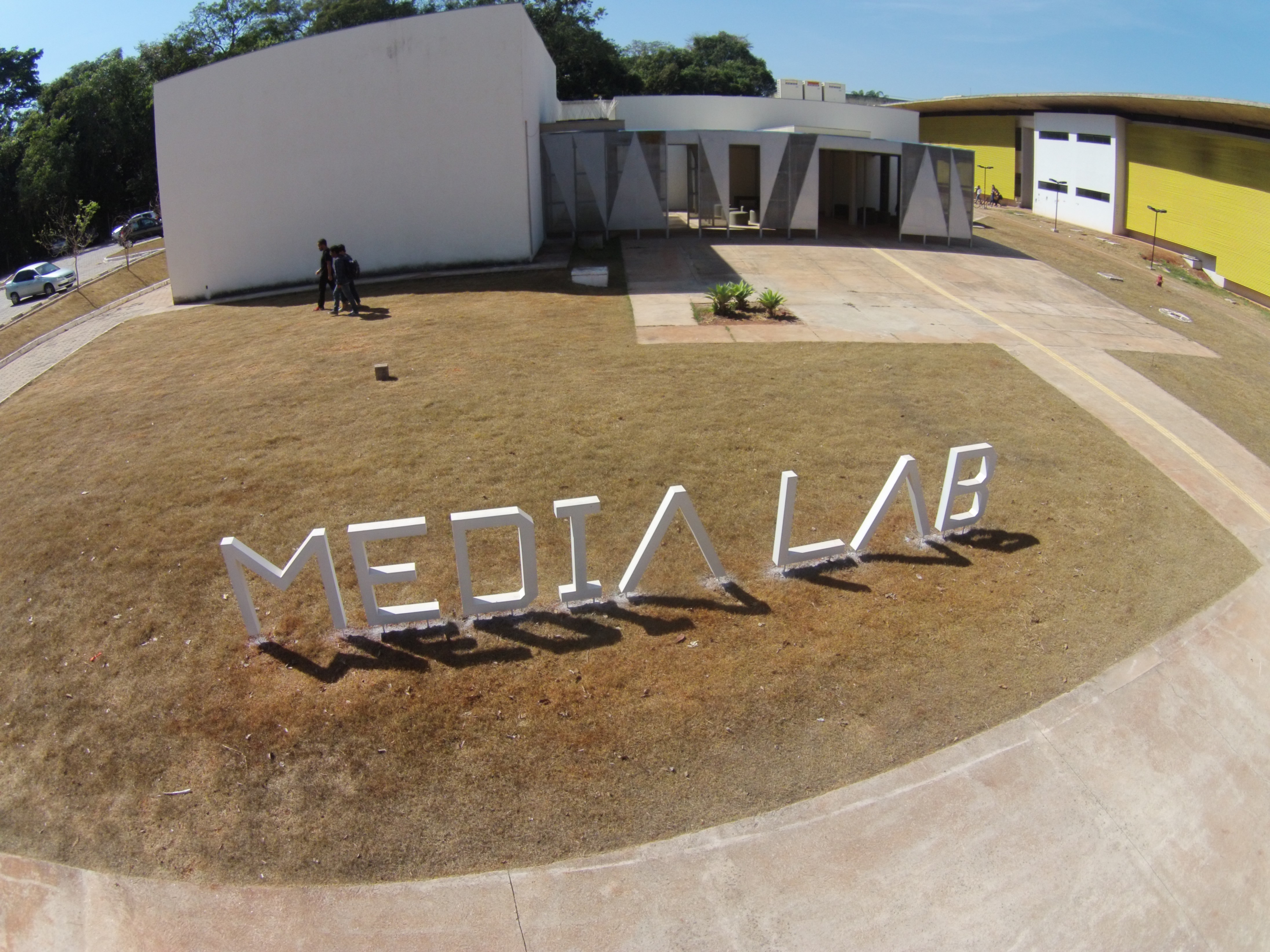 Foto tirada com drone do prédio do Media Lab/UFG